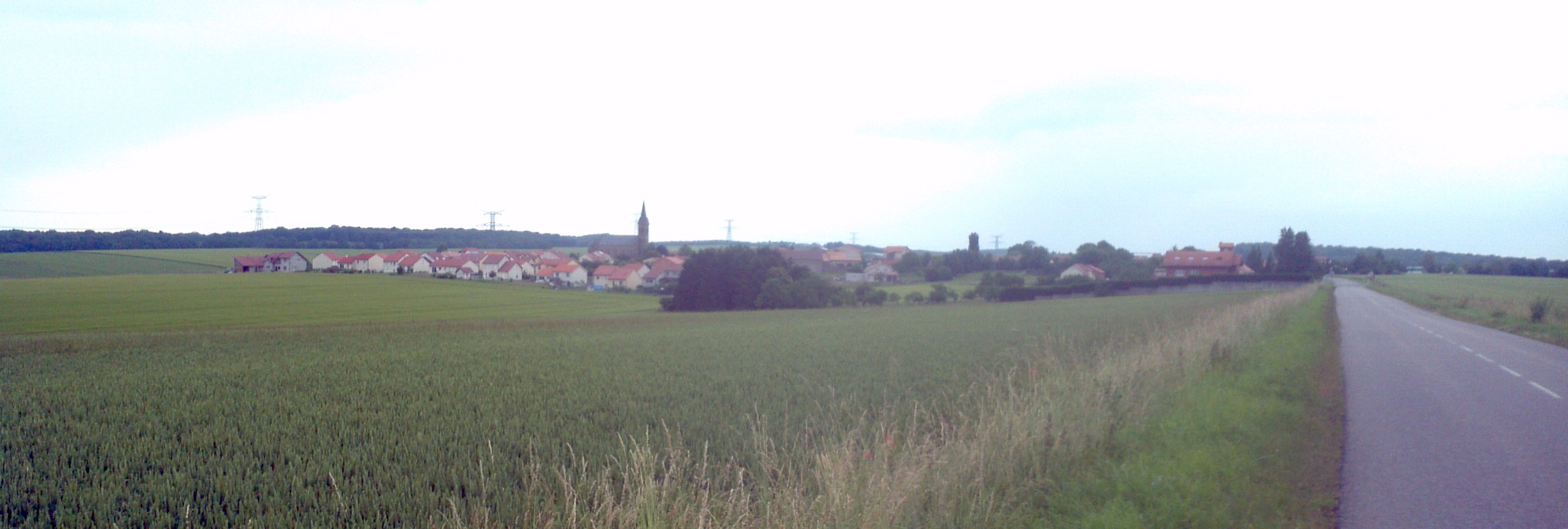 Ortsbild von Vry, Lothringen